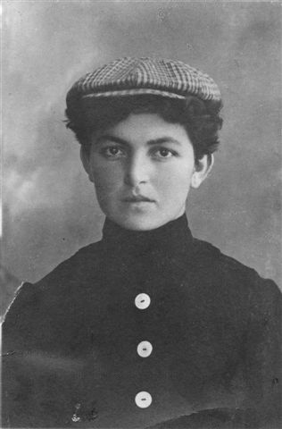 מרים ברץ הייתה מראשוני דגניה א' ומייסדת הרפת בקיבוץ בצעירותה